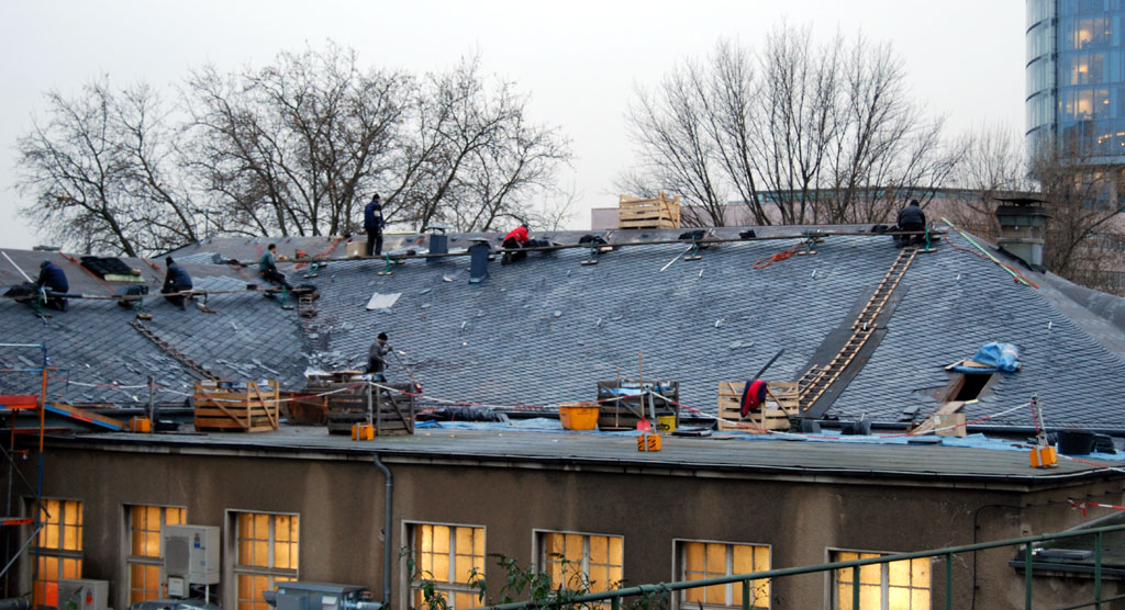 Dachdecker legen eine neue Schiefer-Dachdeckung am Bahnhof Köln Messe/Deutz an.